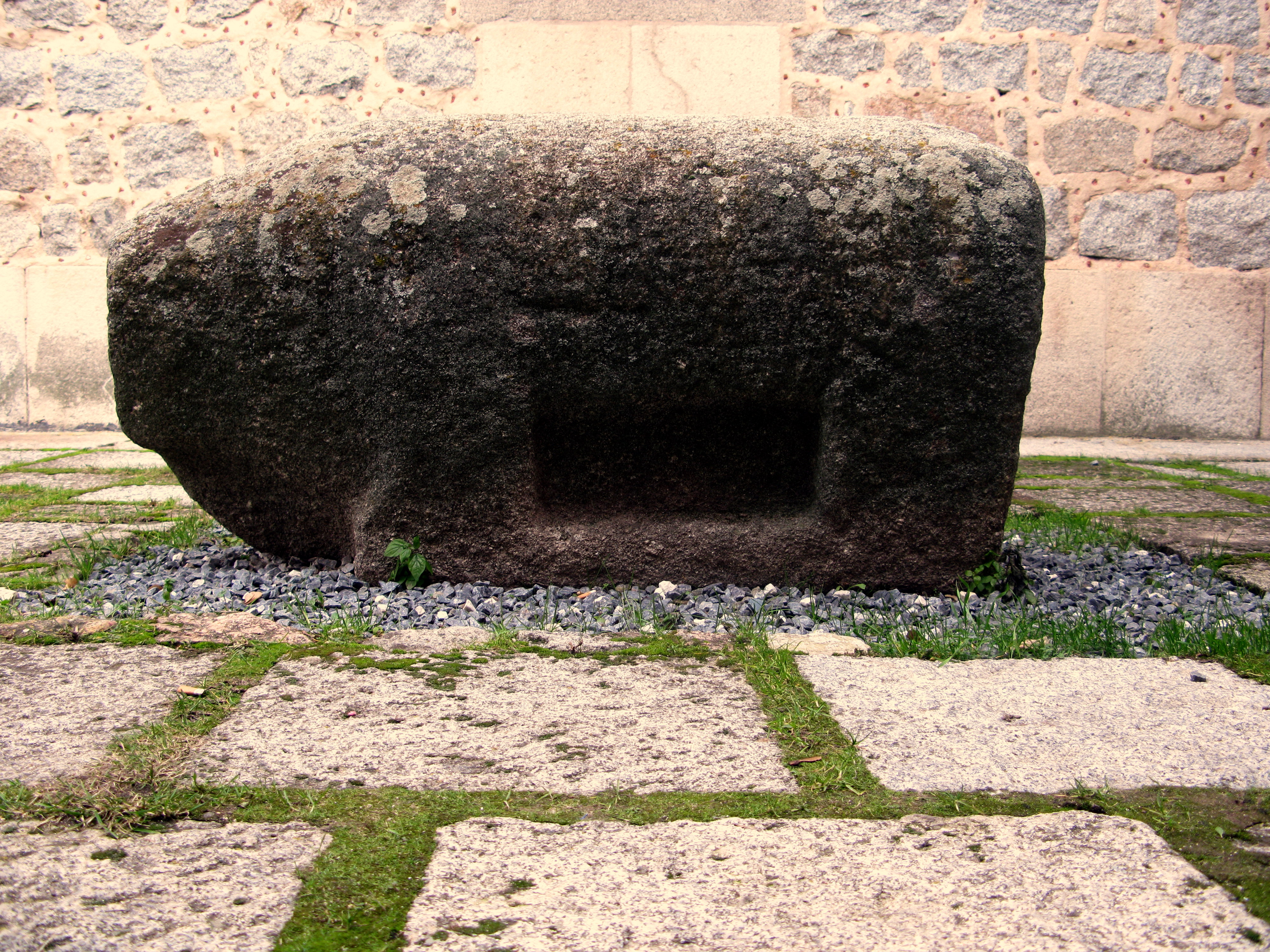 Son el símbolo de una sociedad ganadera ya desaparecida cuyo valor, difuminado por el paso del tiempo, ha llegado hasta nosotros, tambien puede que fueran autenticas imágenes de culto zoolátrico, un culto en el que se adorase a los animales sagrados: puede ser el caso del impresionante conjunto de los Toros de Guisando en Ávila.